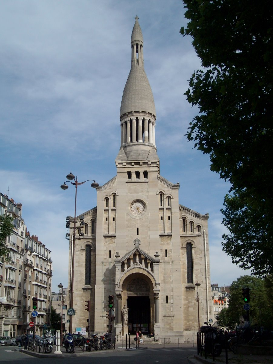 Vue de face de l'église